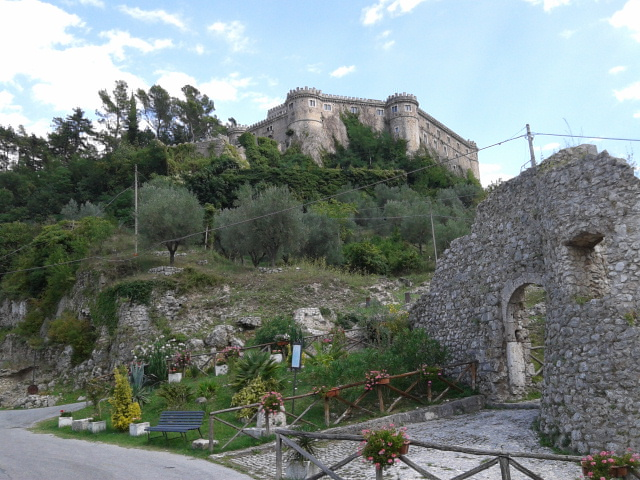 Castello Piccolomini di Balsorano